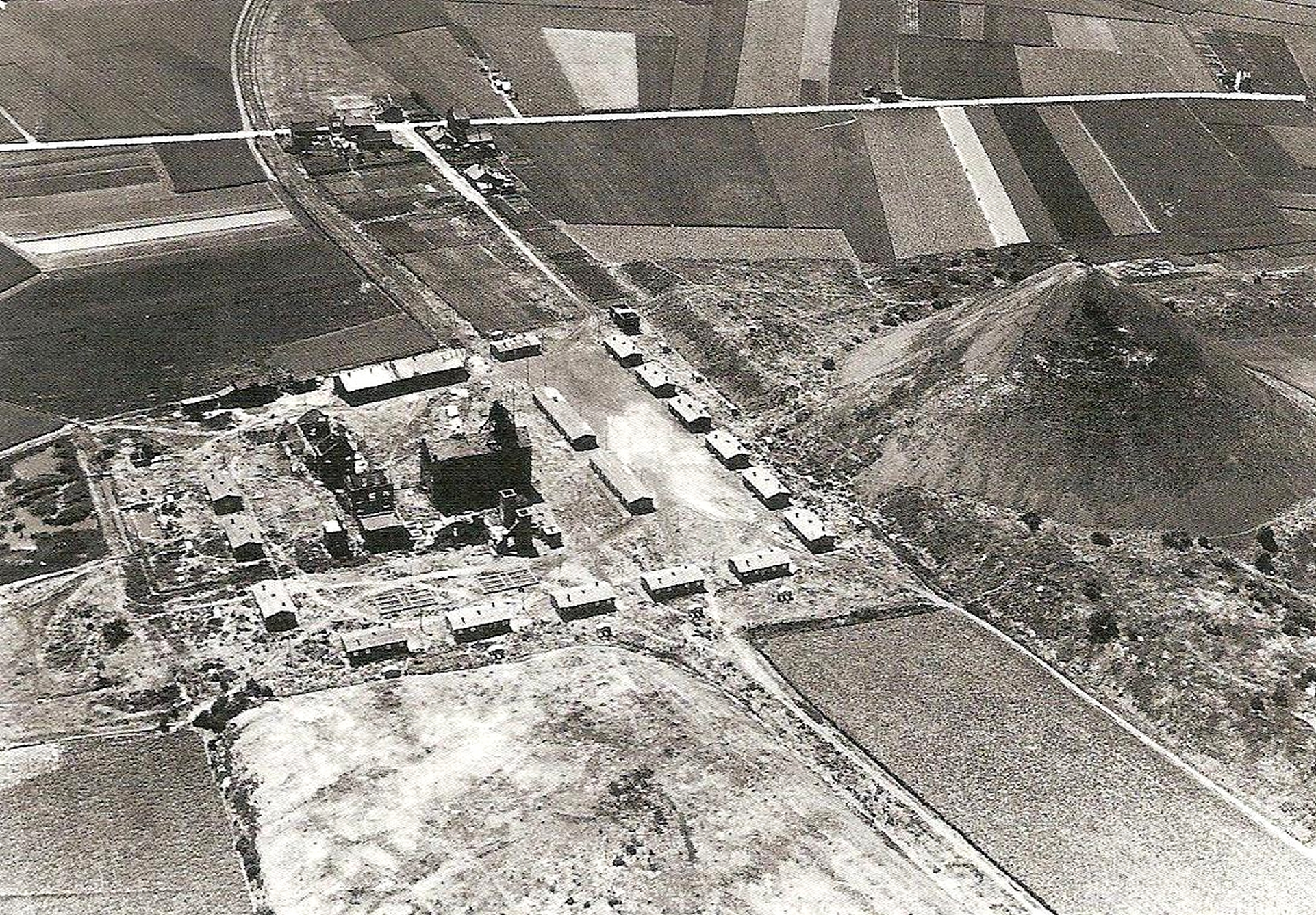 La fosse Lambrecht était une mine souterraine de houille exploitée par la Compagnie des mines d'Anzin, puis par le Groupe de Valenciennes à Wallers, dans le bassin minier du Nord-Pas-de-Calais, en France.